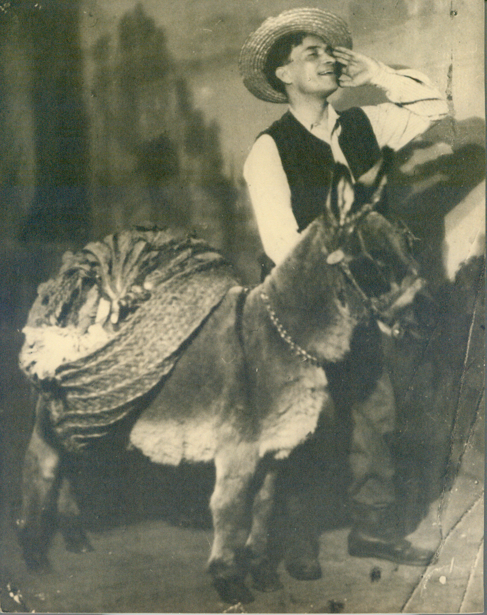 Raffaele Viviani in'O vico al teatro Eden nel 1917